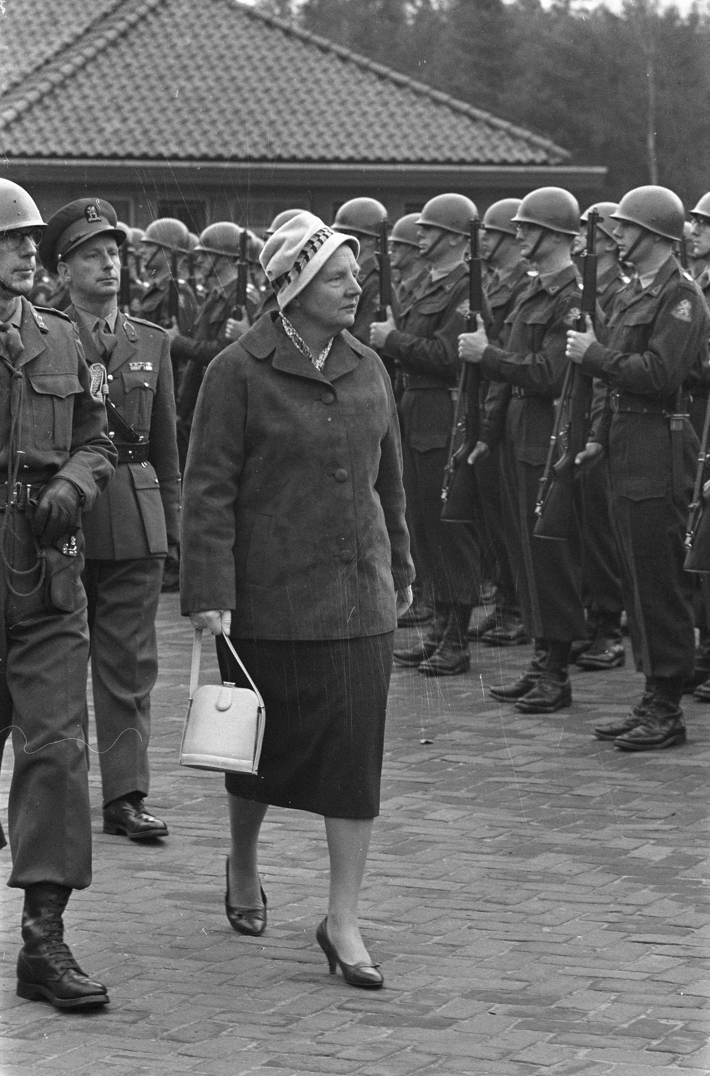 Collectie / Archief : Fotocollectie Anefo Reportage / Serie : [ onbekend ] Beschrijving : Koningin Juliana bezoekt de Ir. Jonkie school te Hwijk Datum : 26 november 1959 Trefwoorden : koningin, scholen Persoonsnaam : Ir. Jonkie school, Juliana (koningin Nederland) Fotograaf : Pot, Harry / Anefo Auteursrechthebbende : Nationaal Archief Materiaalsoort : Negatief (zwart/wit) Nummer archiefinventaris : bekijk toegang 2.24.01.05 Bestanddeelnummer : 910-8472